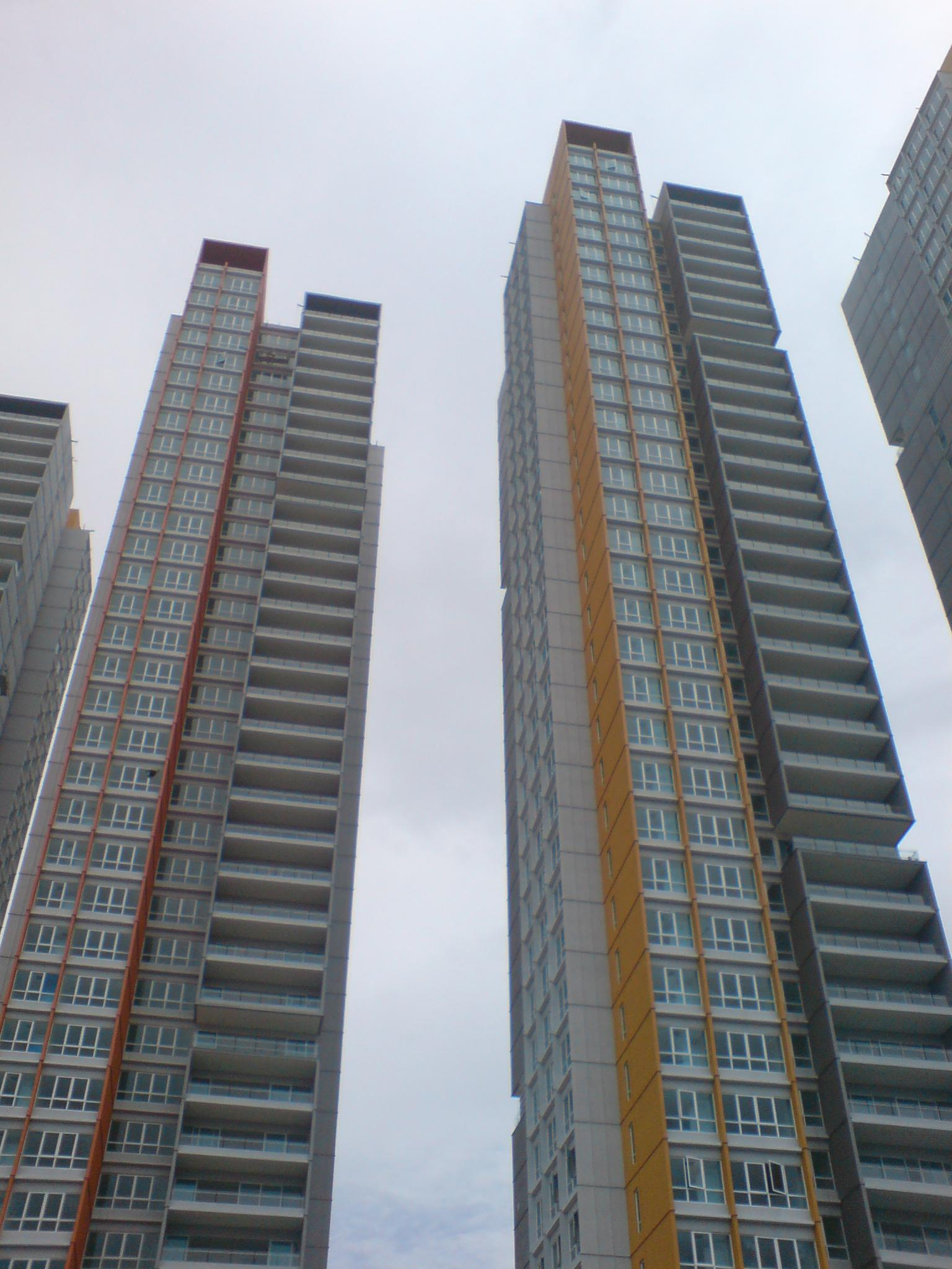 Central Park Penang